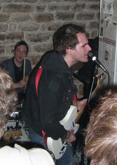 Pat et Phil de Latterman, en concert à Paris le 7 avril 2006, au Saphir 21. Photo personnelle. Licensing